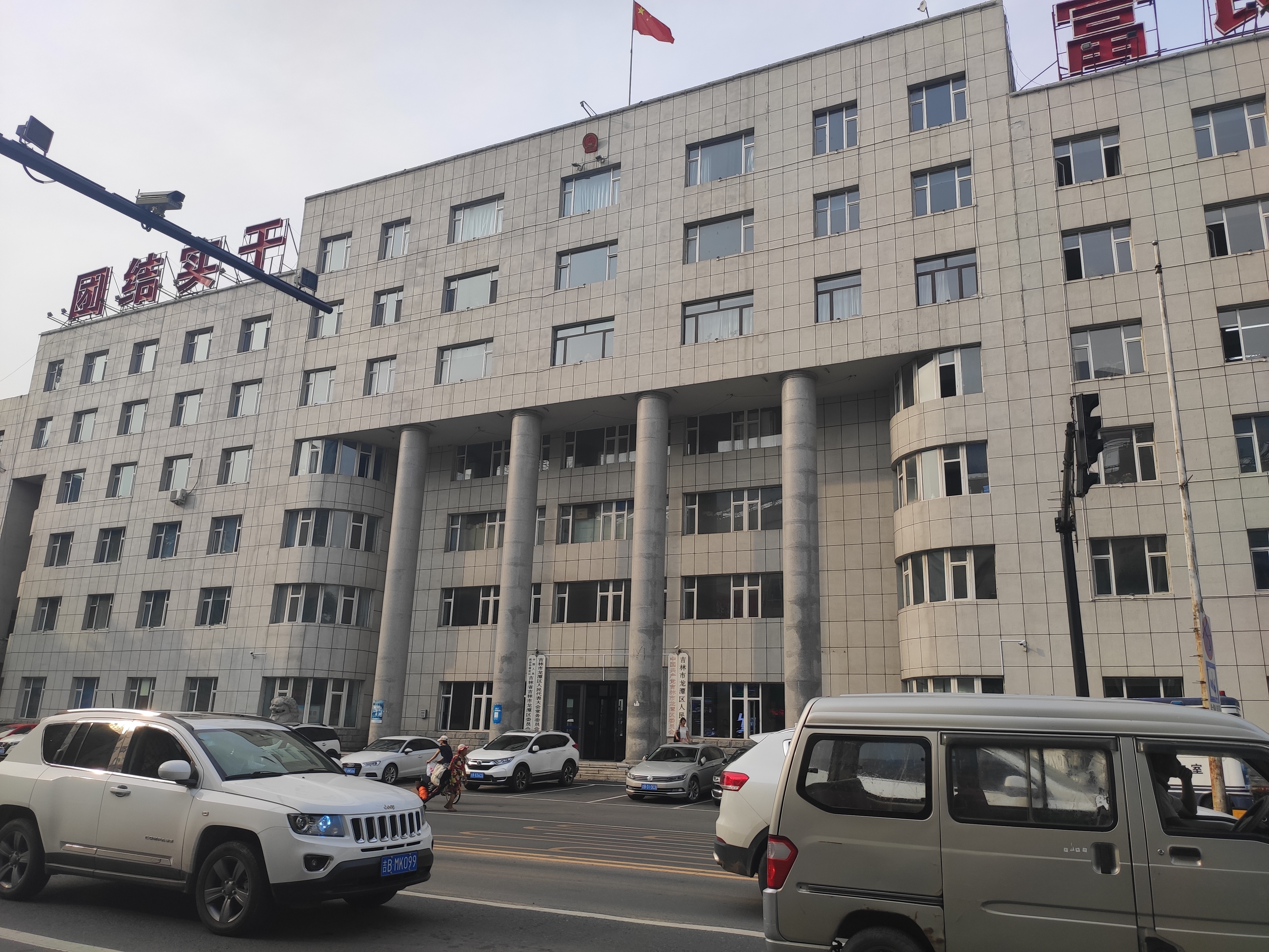 龙潭区政府大楼